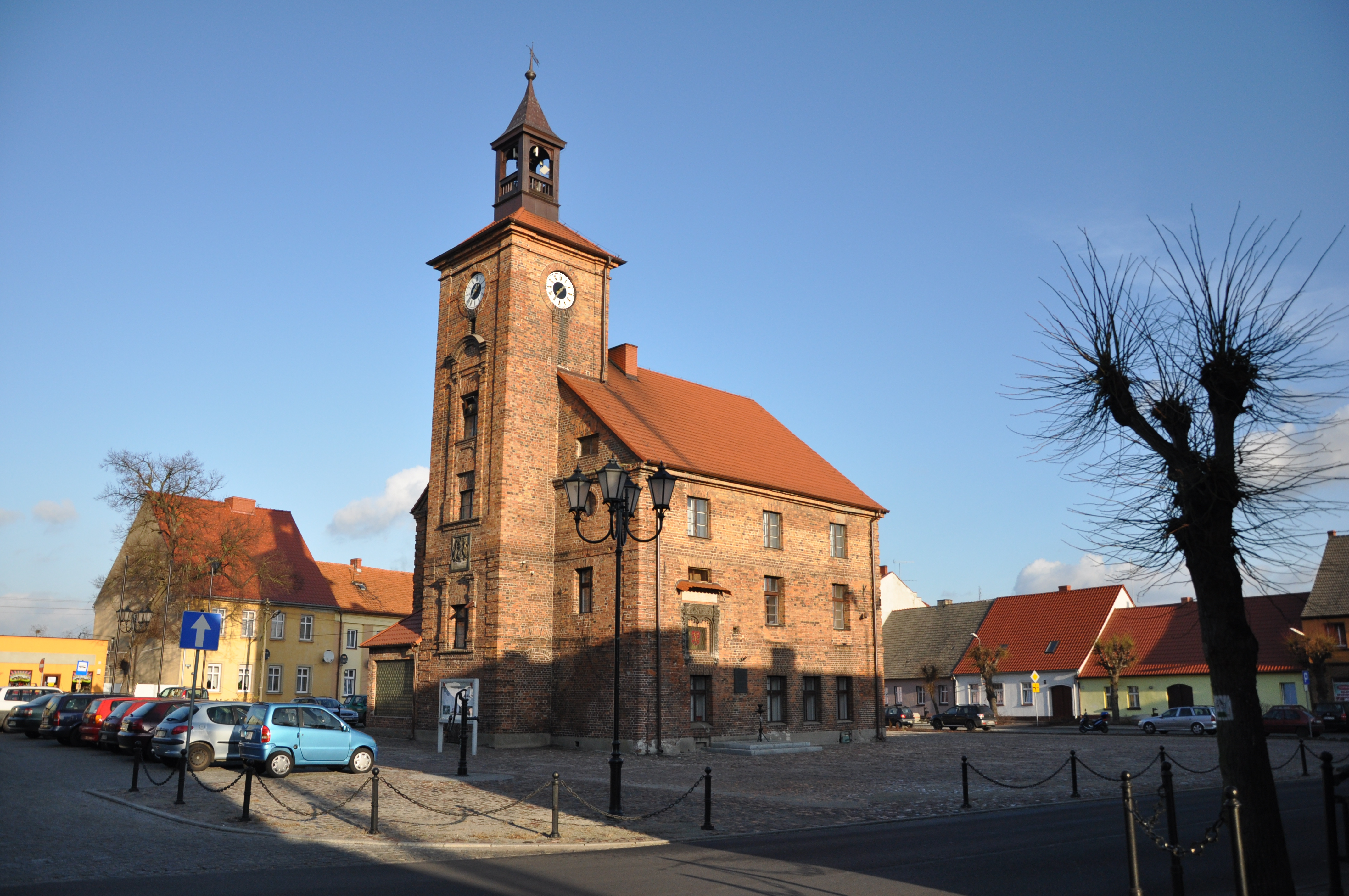 Rynek w Obrzycku